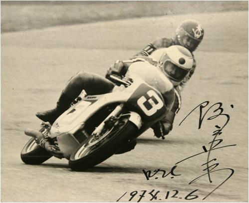 隅谷守男&CB500R 鈴鹿サーキットにて